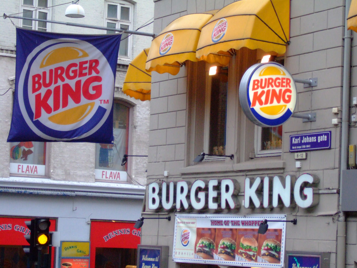 Burger King at Karl Johan in Oslo, Norway